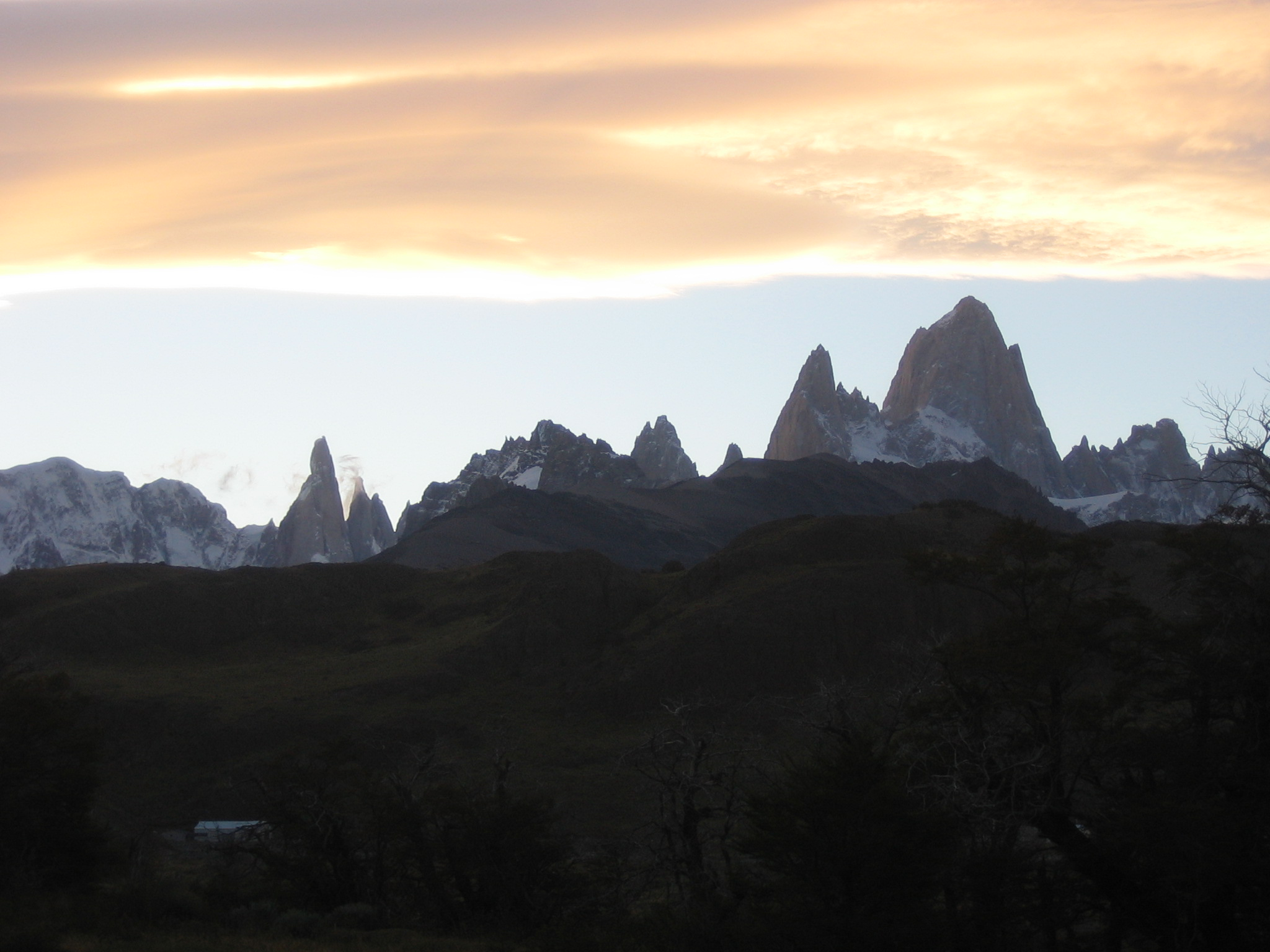 Cerro Torre und Fitzroy, Argentinien